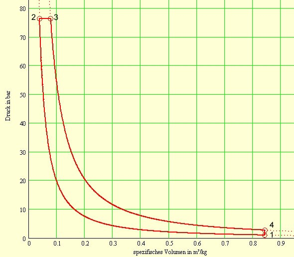 Dieselprozess im p-v-Diagramm